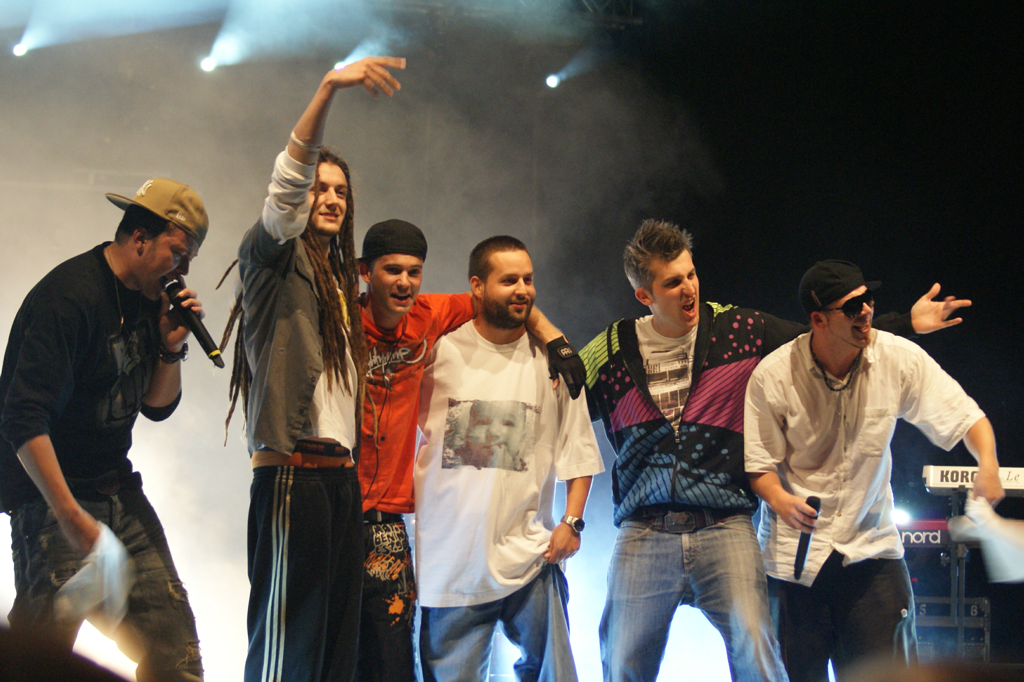 Afromental. From left: Wojciech Łozowski, Aleksander Milwiw-Baron, Grzegorz Dziamka, Wojciech Witczak, Bartosz Śniadecki, Tomasz Lach. (Tomasz Torres missing.)